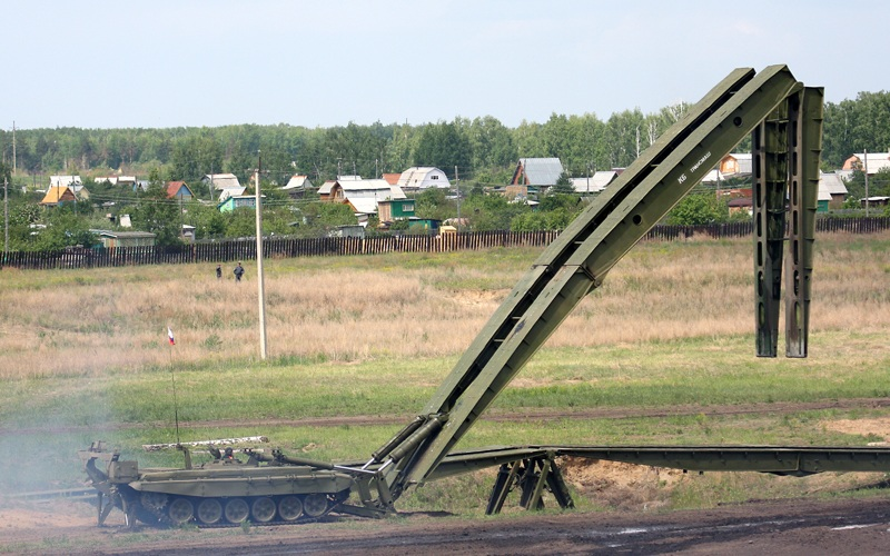 Мостоукладчик МТУ-90 на выставке ВТВТ-Омск-2009.